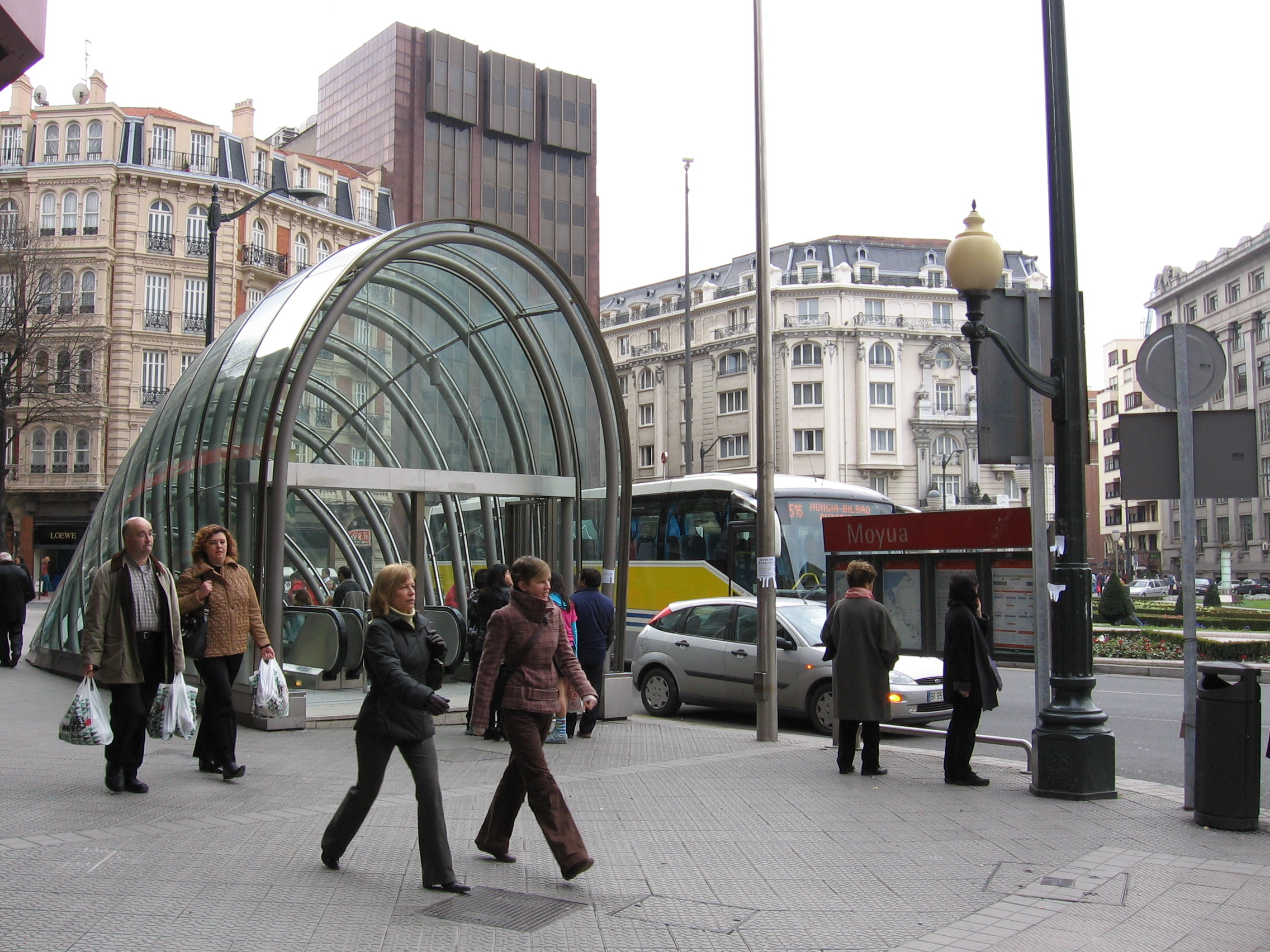 Eingang des Bahnhofs Moyua (Federico Moyúa Platz, Bilbao) der Metro Bilbao